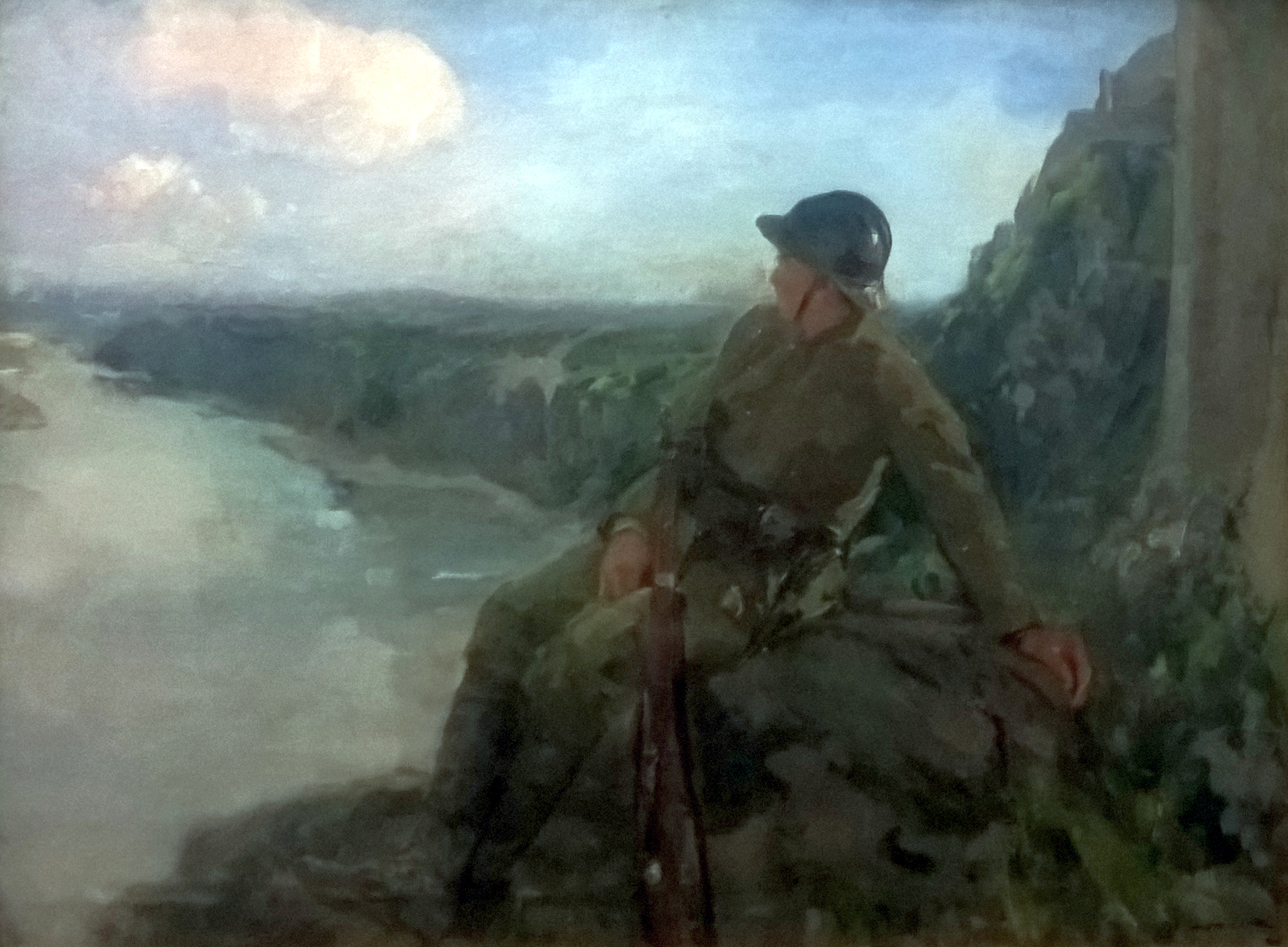 Santinela - Muzeul Național de Artă al României